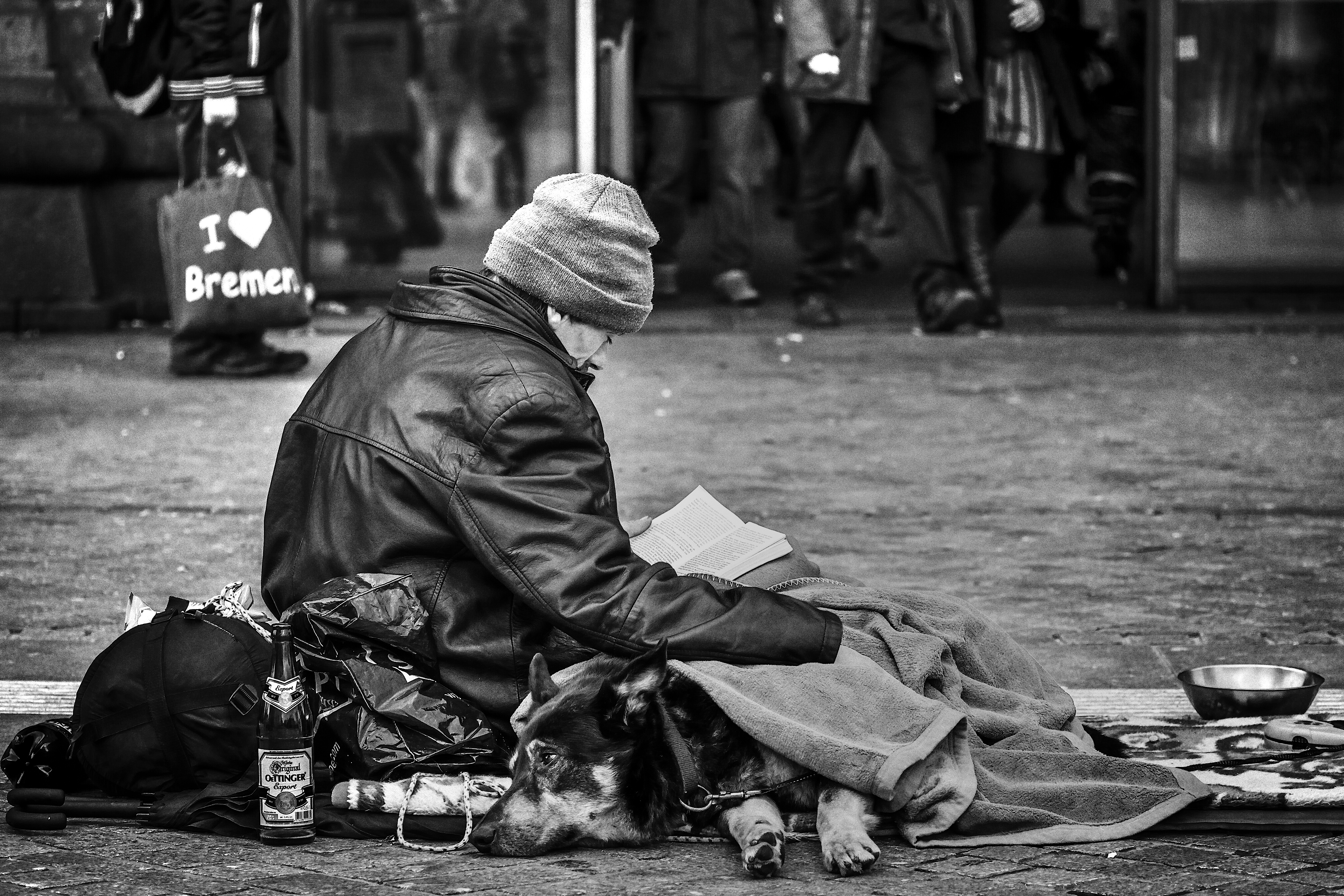 Obdachloser Mann mit Hund in der Innenstadt von Bremen, Deutschland.